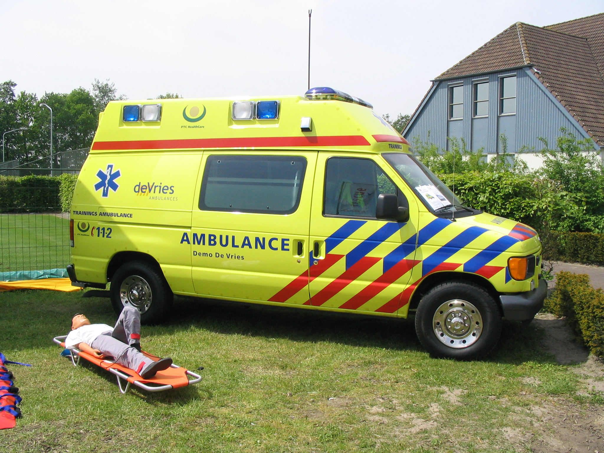 Zelf gemaakte foto